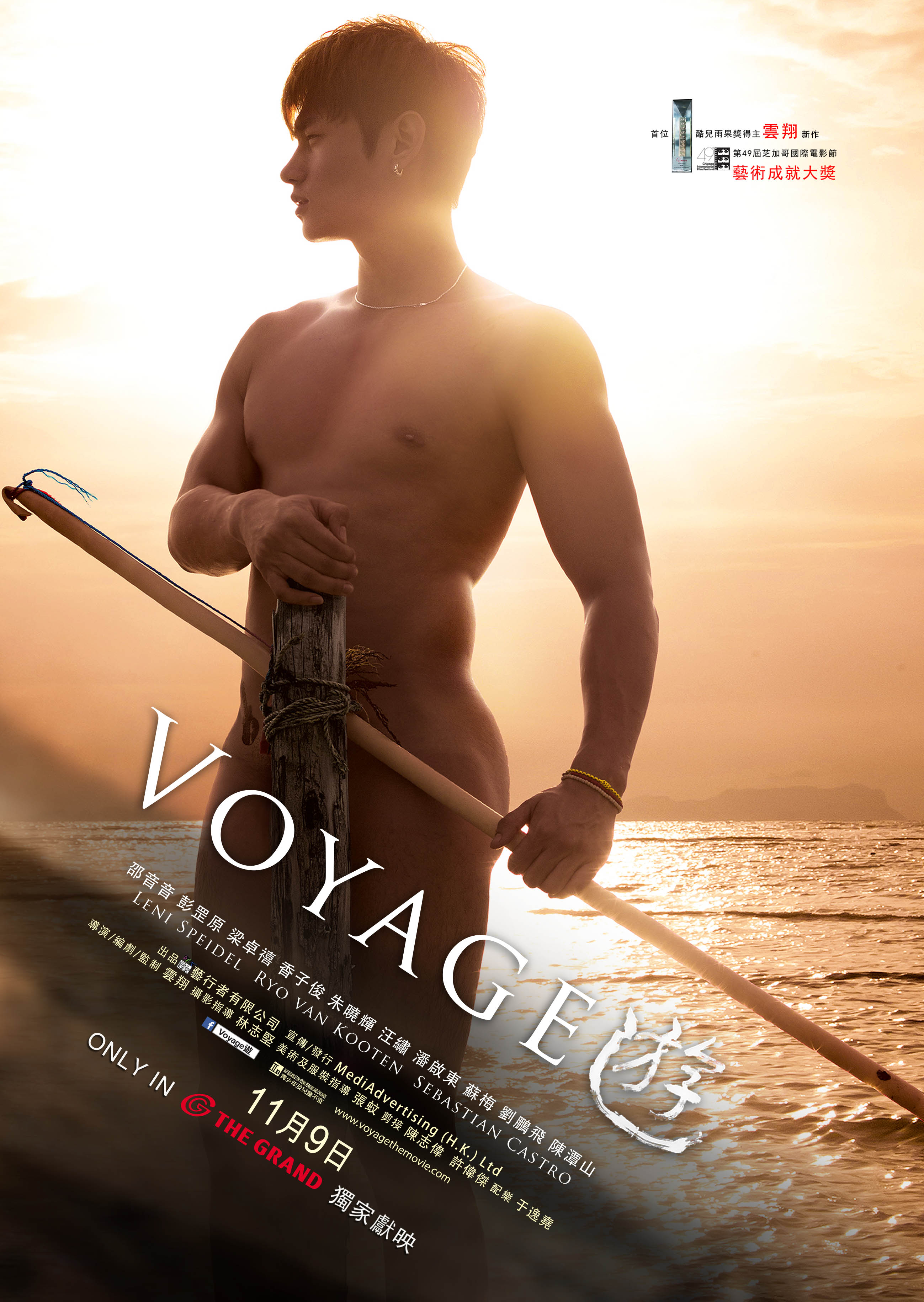 人生一遊，有人樂極但求旅程永無終站，有人生悲只願末日馬上降臨。 打破性別的界線，以深入探討關於抑鬱症和自殺的議題，無論男男女女皆為愛沉淪，不求活得轟轟烈烈，只求死得匪夷所思。 與抑鬱症搏鬥半生的雲翔，拍下他第五部電影：《遊》，由一位精神科醫生的最後遊歷，寫更多早夭者的命誌。除於香港，更遠赴內蒙古，馬來西亞，澳洲，德國及荷蘭等不同國家地區取景拍攝。 雲翔的最新作品《遊》入圍了第四十九屆芝加哥國際電影節，同時導演雲翔也獲大會頒發了”藝術成就獎”，表揚雲翔於「男女同志，雙性戀及跨性別」（LGBT）電影界的努力和貢獻。另外，《遊》亦為第三十七屆聖保羅國際電影節參展電影。